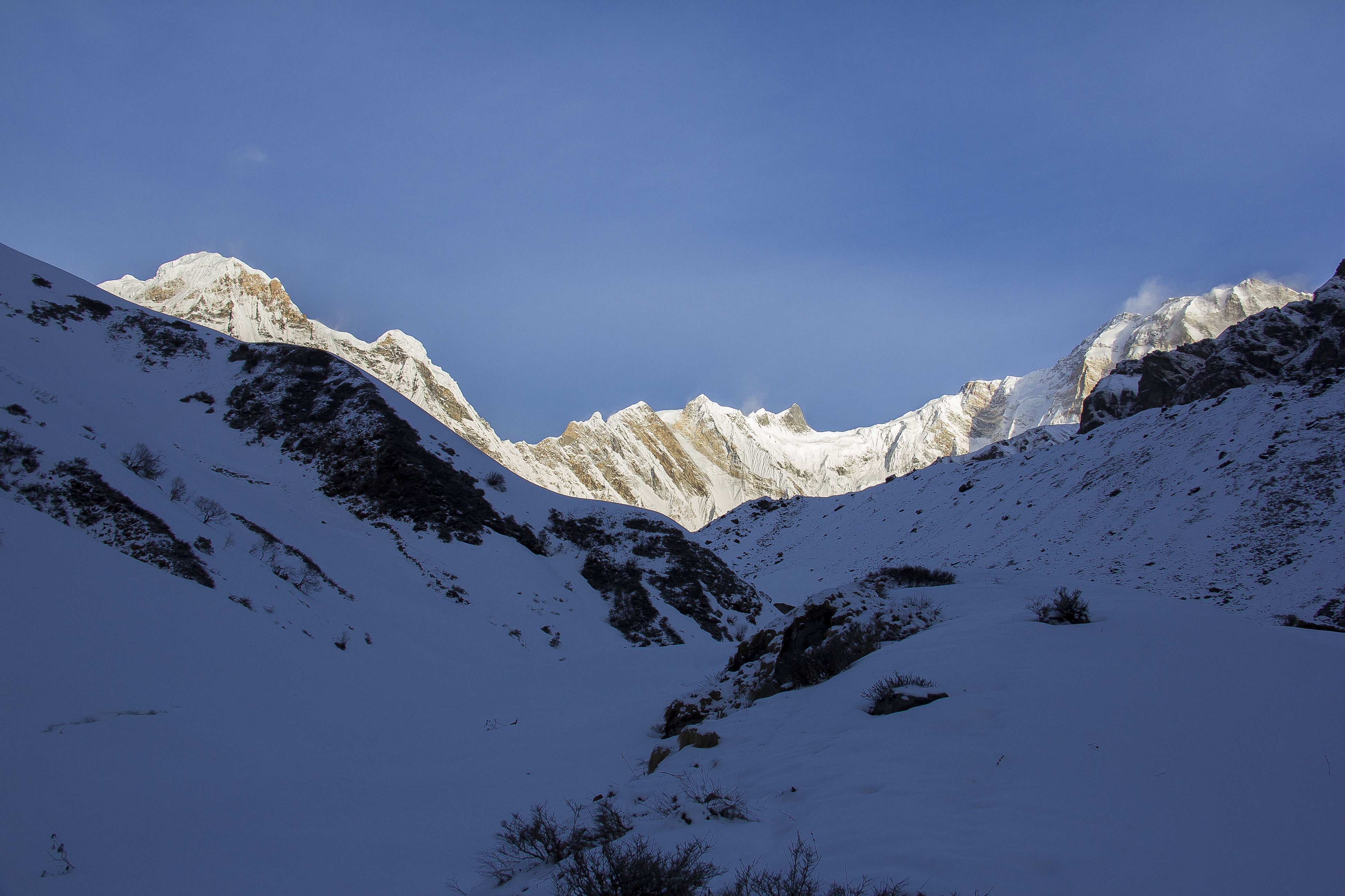 नेपाली: अन्नपुर्ण अाधार शिविर पदमार्गबाट देखिएको अन्नपुर्ण हिमालय श्रृङ्खला